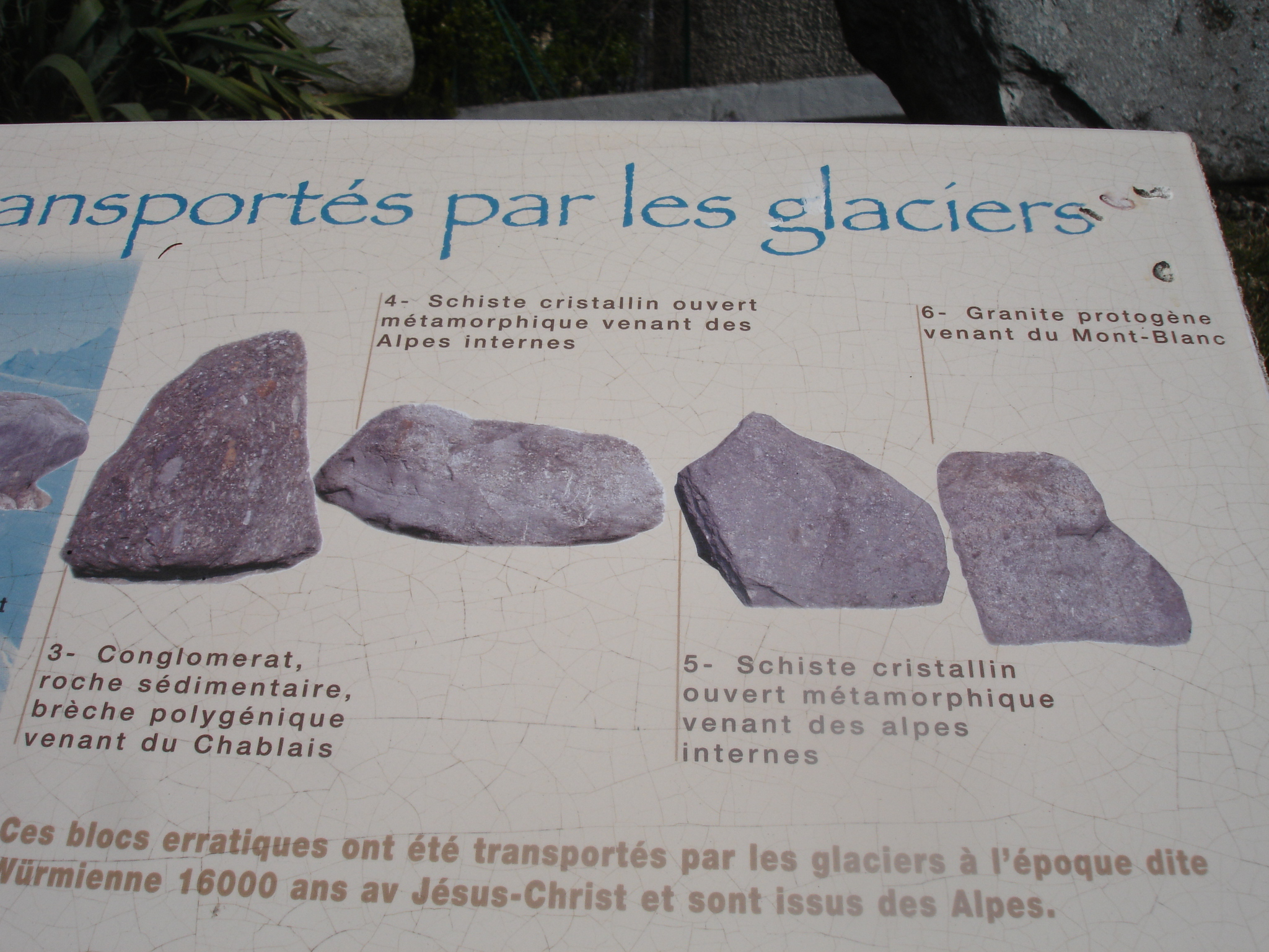 Grenay (38) : présentation des blocs morainiques